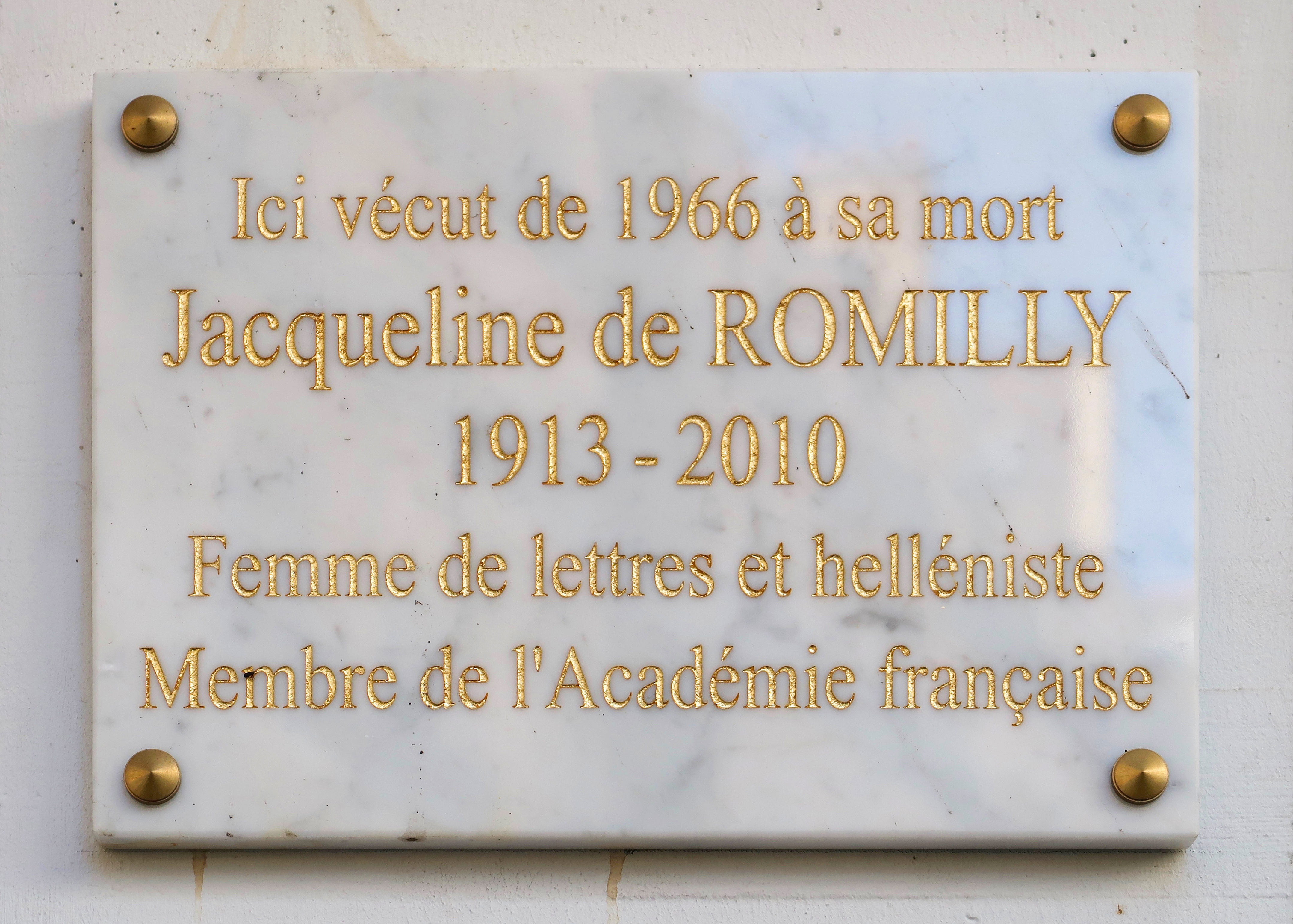 Plaque en hommage à Jacqueline de Romilly, 12 rue Chernoviz (Paris, 16e).